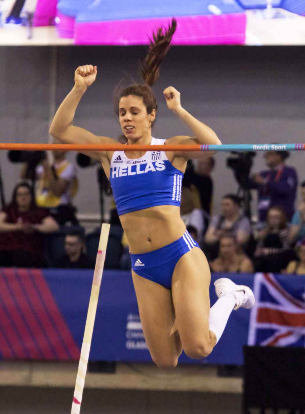 EKI30343 finale polsstok stefanidi